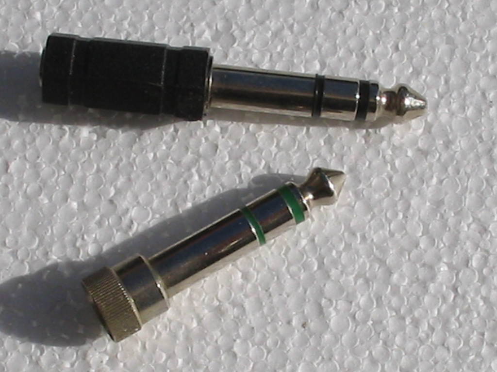 Twee stereo-adapterpluggen van 3,5 mm (mini jack) naar 6,3 mm (jack) voor een hoofdtelefoonaansluiting